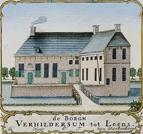 Borg Verhildersum in Leens. Uitsnede uit de kaart van Theodorus Beckeringh uit 1781